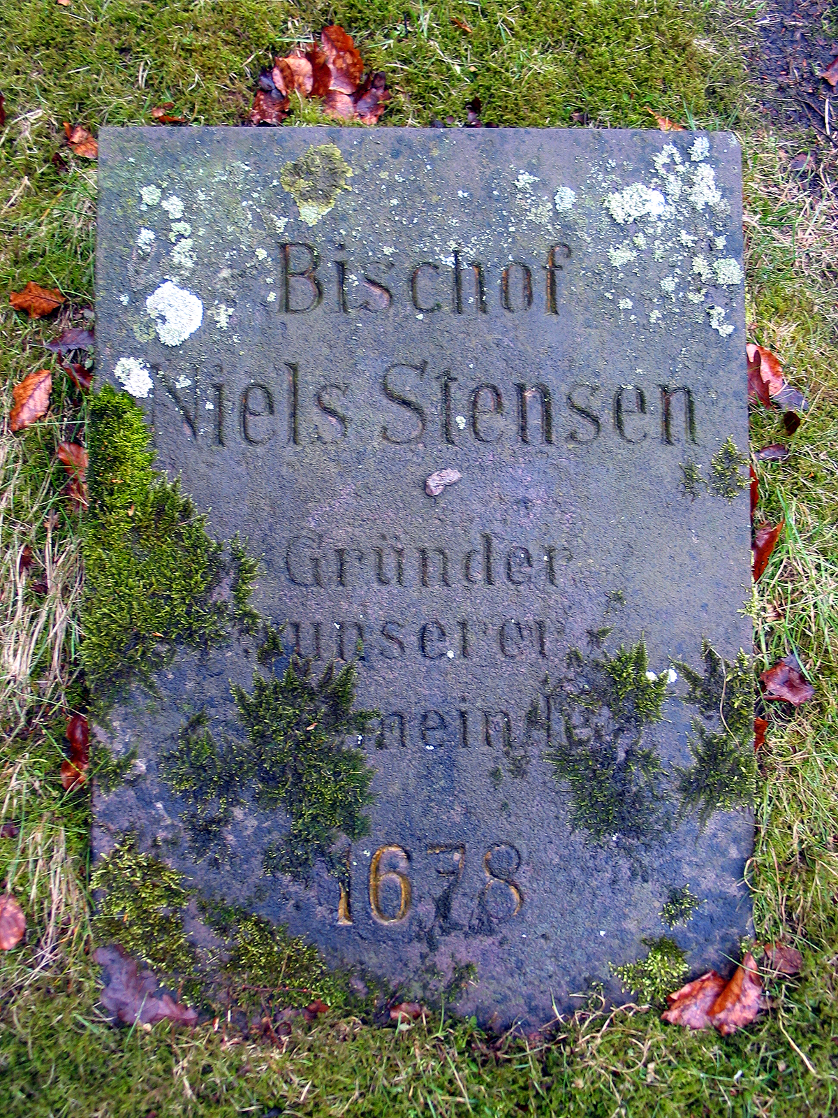 Ein offensichtlich in jüngerer Zeit verlegter Gedenkstein auf dem Kirchhof von St. Ludwig für den Bischof Niels Stensen, laut Inschrift "Gründer unserer Gemeinde 1678" ...